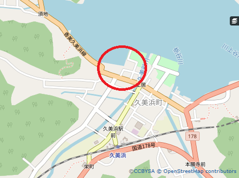 Description This map may be incomplete, and may contain errors. Don't rely solely on it for navigation. AuthorOpenStreetMap contributorsDate (see file history)Sourceopenstreetmap.orgPermission(Reusing this file) OpenStreetMap data is available under the Open Database License (details). Map tiles are licensed under the Creative Commons Attribution-ShareAlike 2.0 license (CC-BY-SA 2.0). Contains map data © OpenStreetMap contributors, made available under the terms of the Open Database License (ODbL). The ODbL does not require any particular license for maps produced from ODbL data; map tiles produced by the OpenStreetMap foundation are licensed under the CC-BY-SA-2.0 licence, but maps produced by other people may be subject to other licences.Open Database LicenseODbL